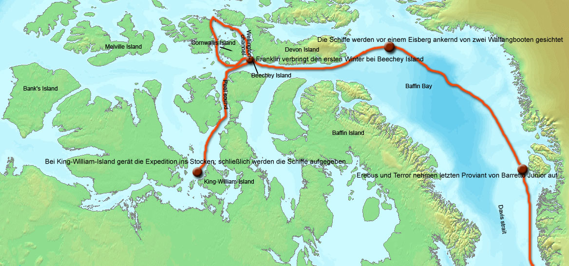 Karte der wahrscheinlichsten Route, die Franklins Expedition genommen haben könnte